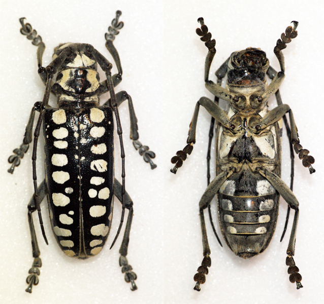 Schultze1923 Sex: Female Data: 05-2013 - Samar - Eastern Viscaya - Philippines Size: ?